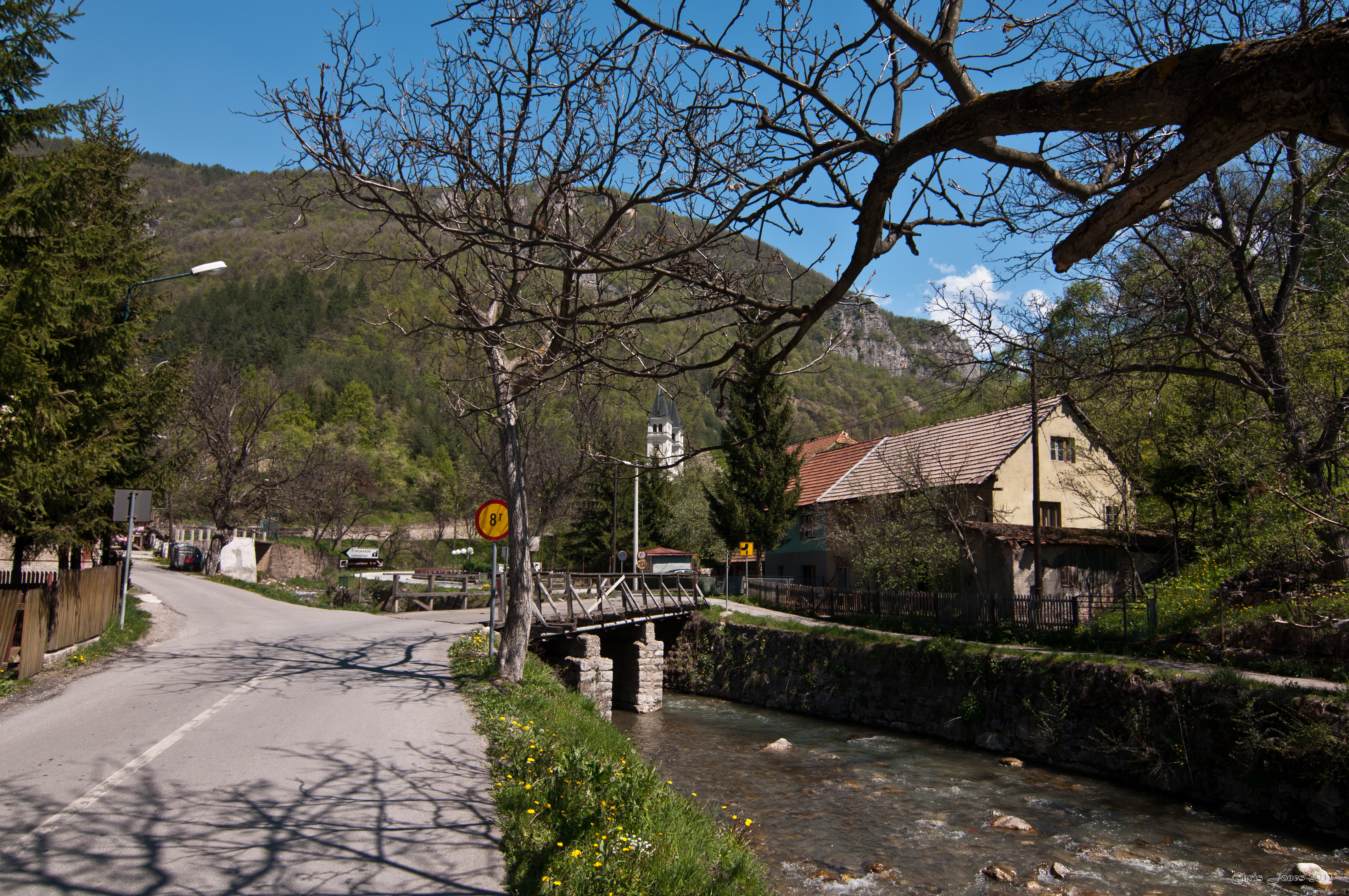 Bosnia and Herzegovina Apr-30-2012 049